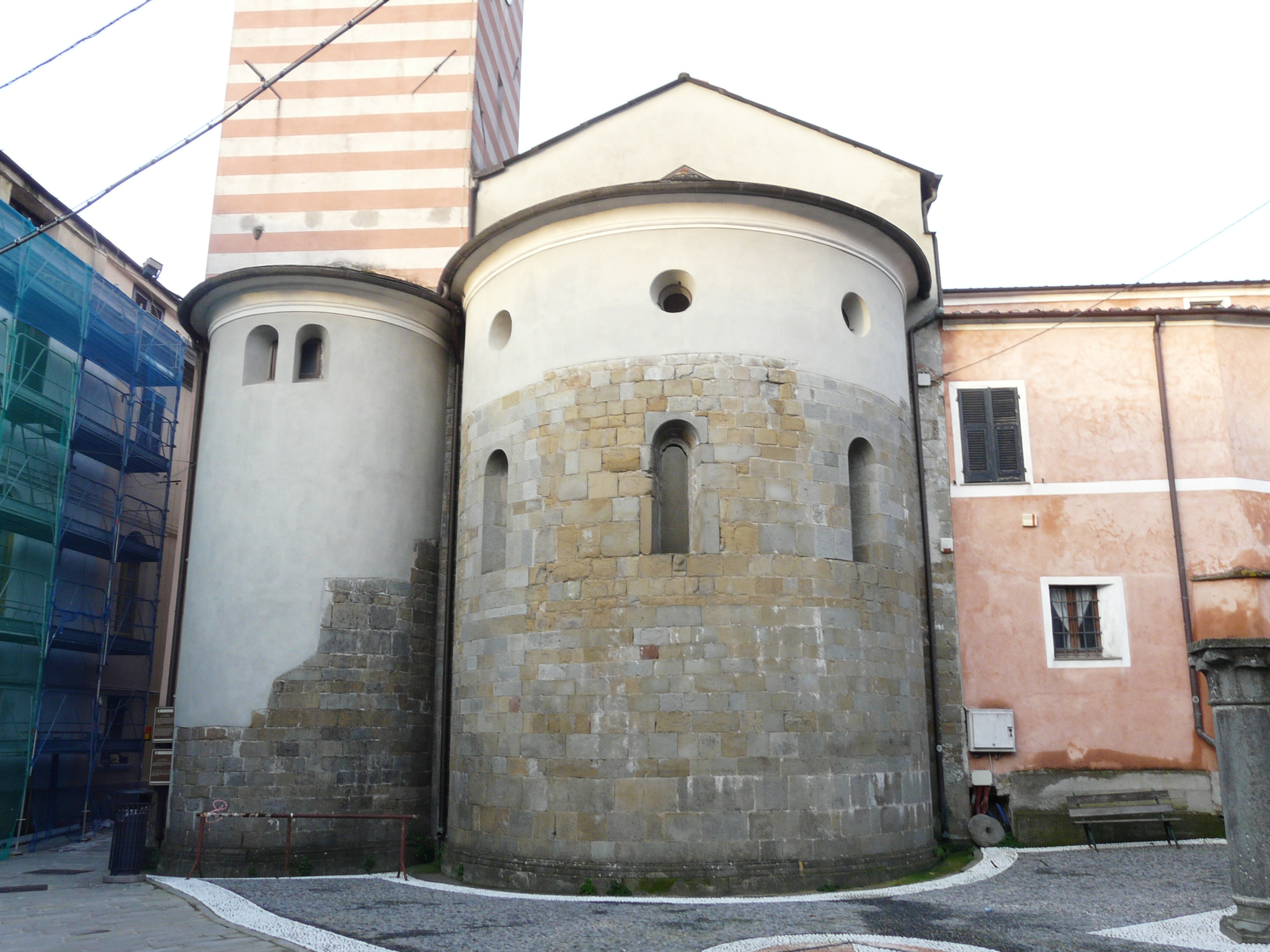 Abside della cattedrale di Brugnato, Liguria, Italia